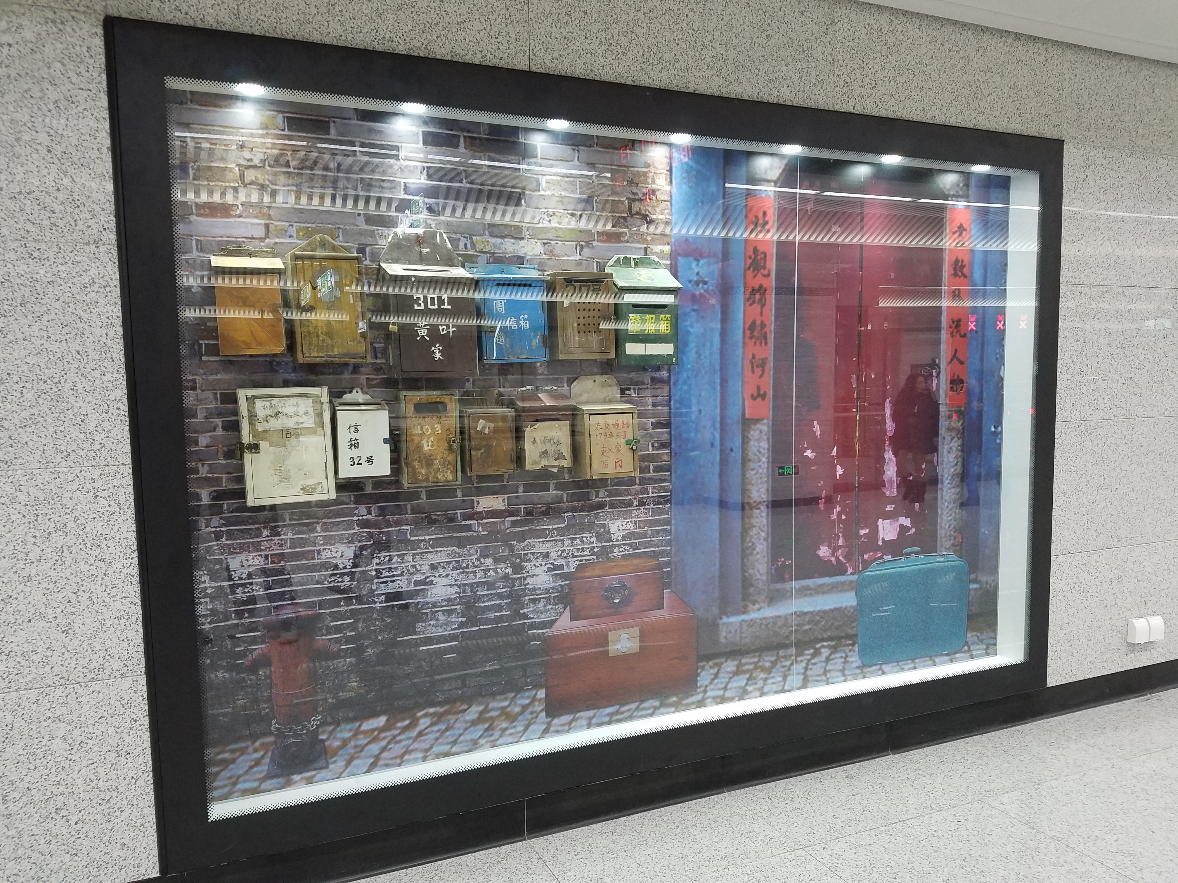 武汉地铁6号线常青花园站